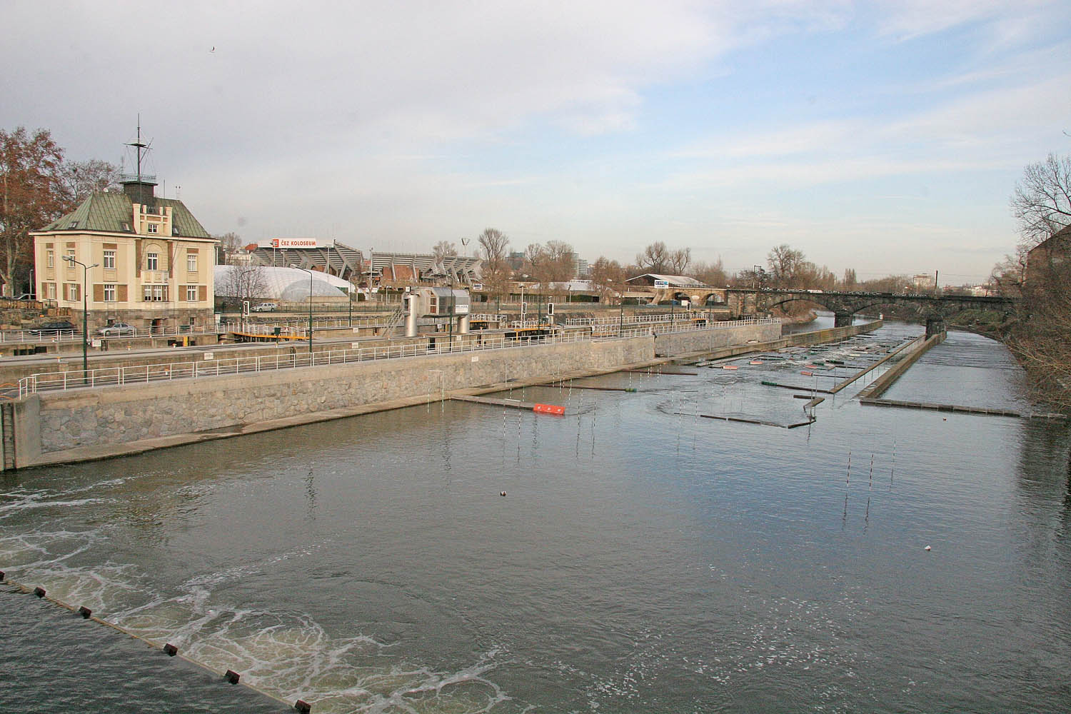 Ostrov Štvanice a veslařský kanál